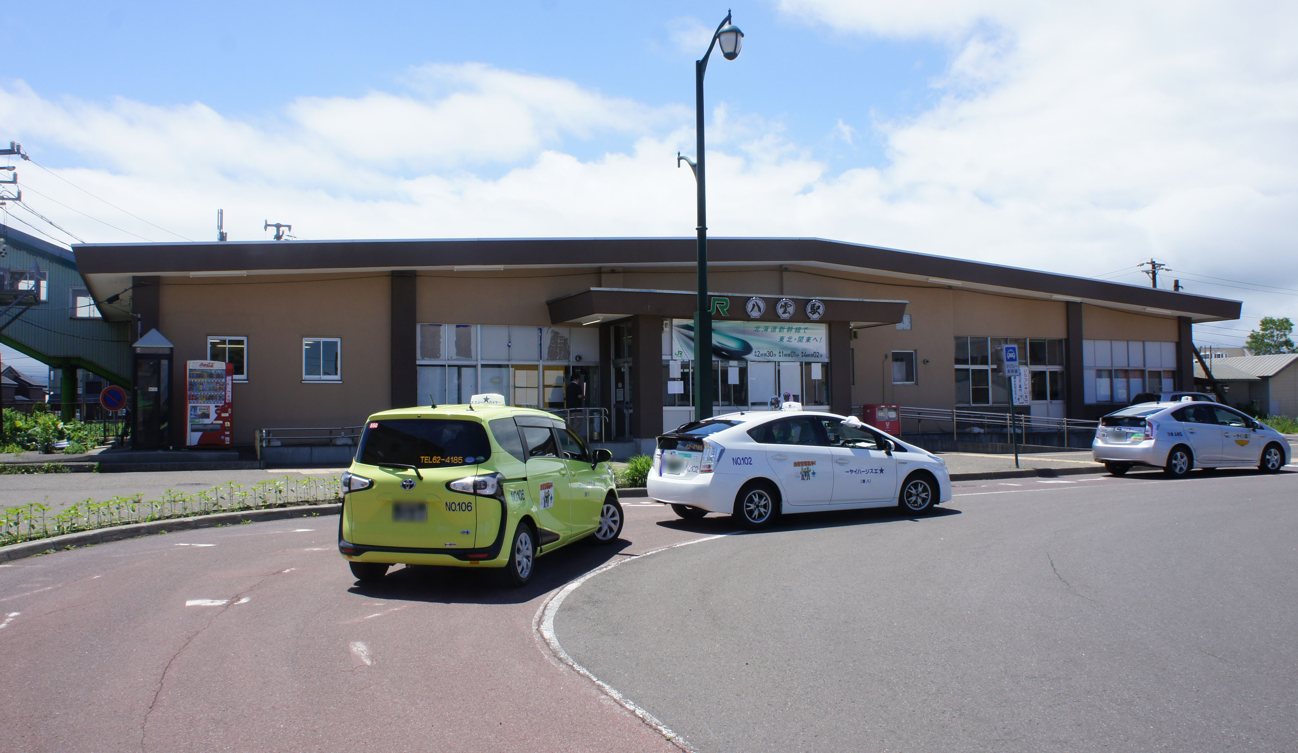 JR函館本線・八雲駅の駅舎